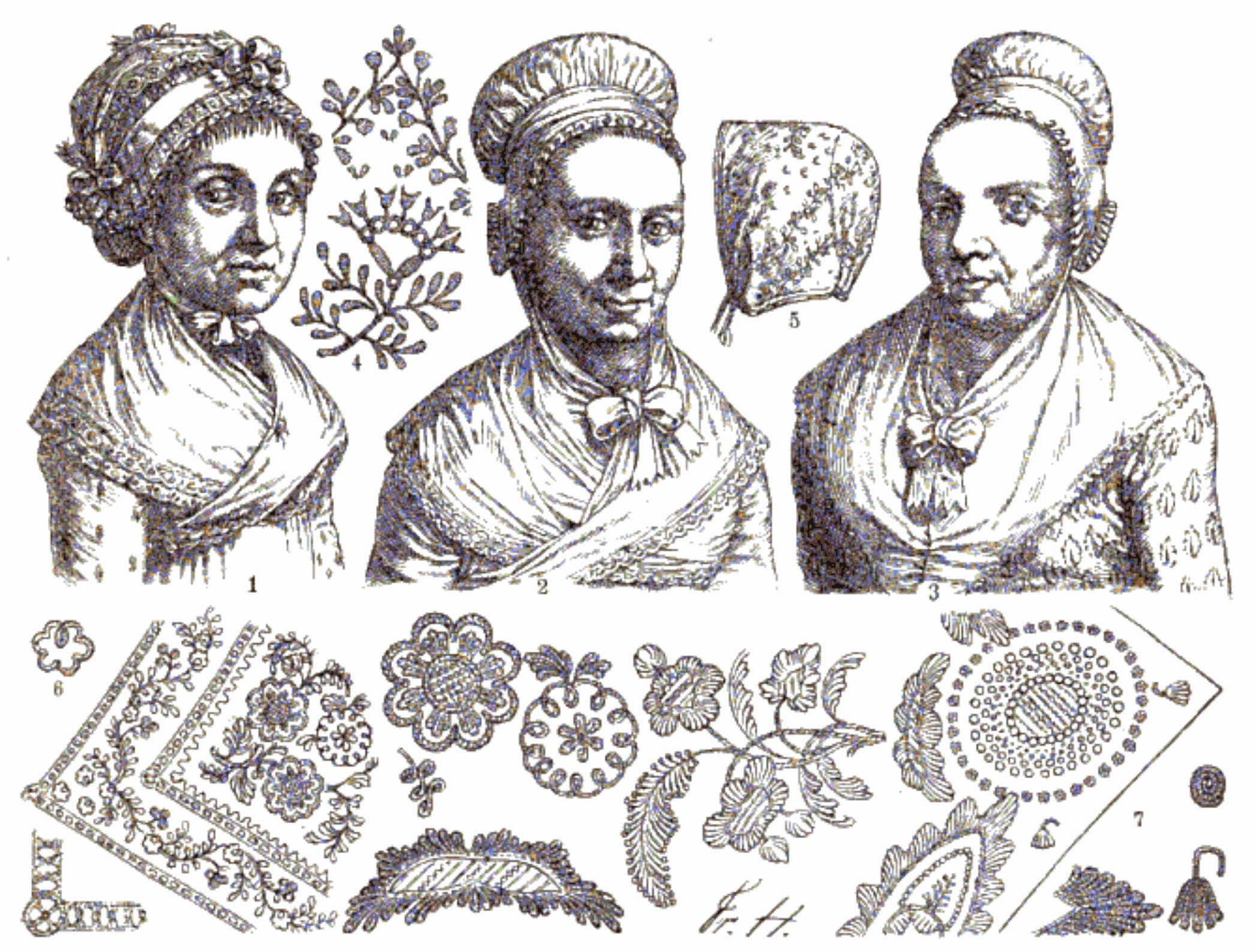 Friedrich Hottenroth: Nassauisches Trachtenbuch Abbildung 17: Aus der Wiesbadener Tracht im ersten Viertel des 19. Jahrhunderts